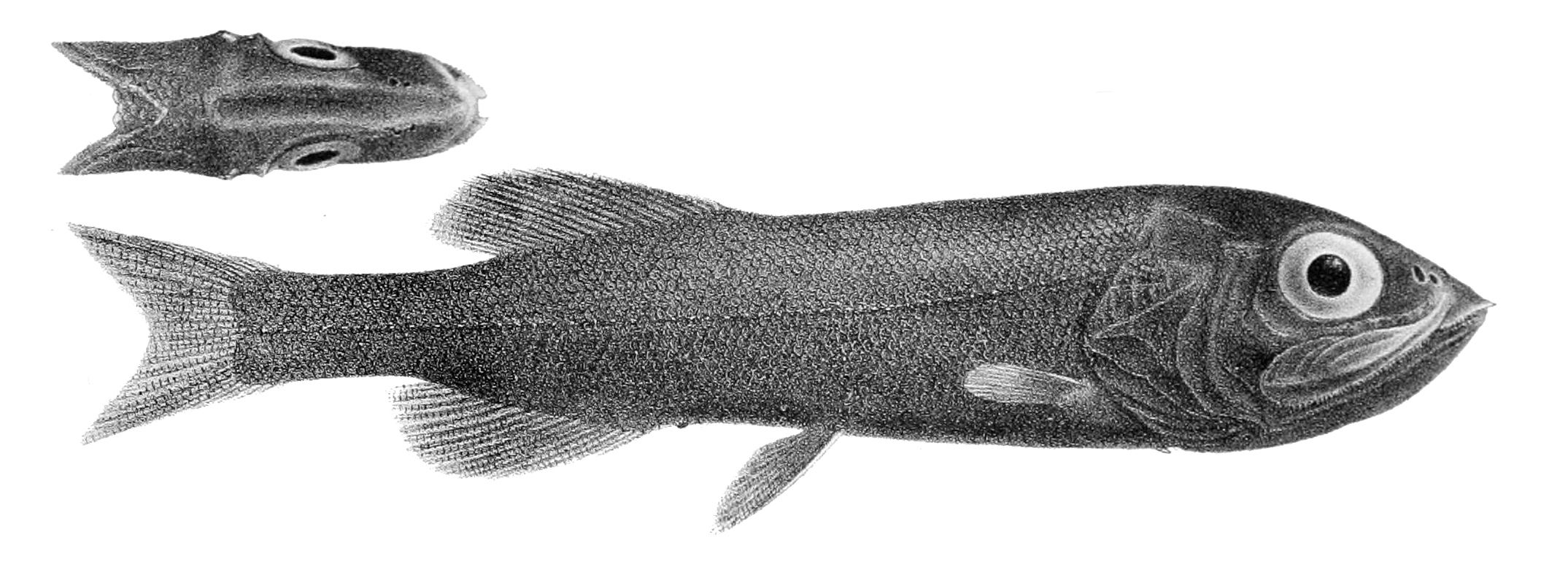 Searsia koefoedi